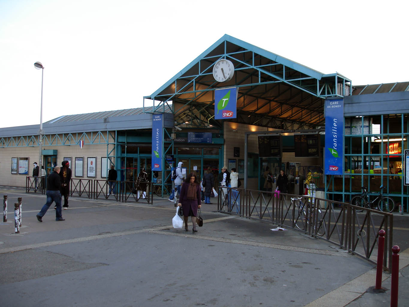 Gare de Bondy (Seine-Saint-Denis), France